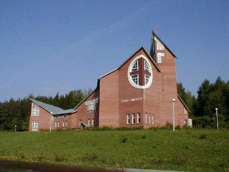 Церковь Благодати ЕХБ (Кирово-Чепецк)